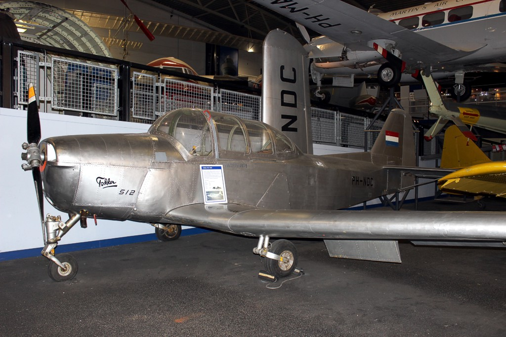 Fokker S.12 prototype PH-NDC in het Aviodrome, Lelystad